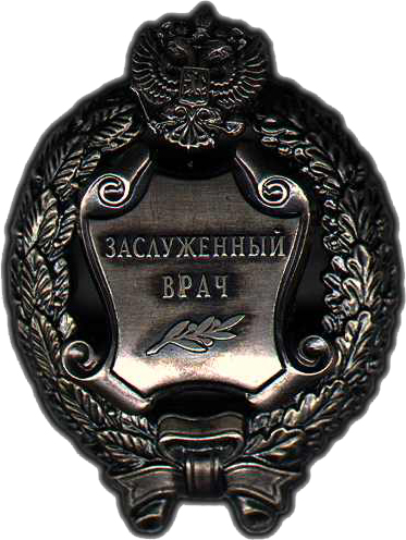 Знак почетного звания "Заслуженный врач Российской Федерации"